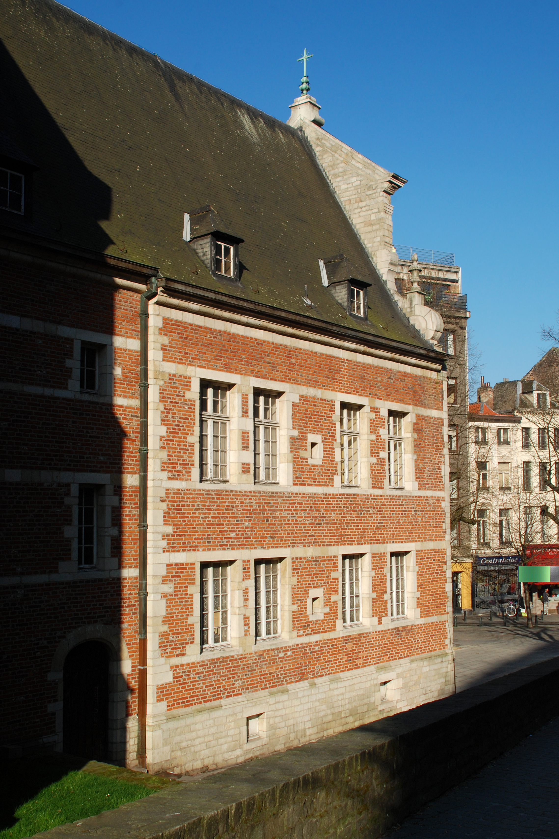 Belgique - Bruxelles - Chapelle Sainte-Anne de Bruxelles